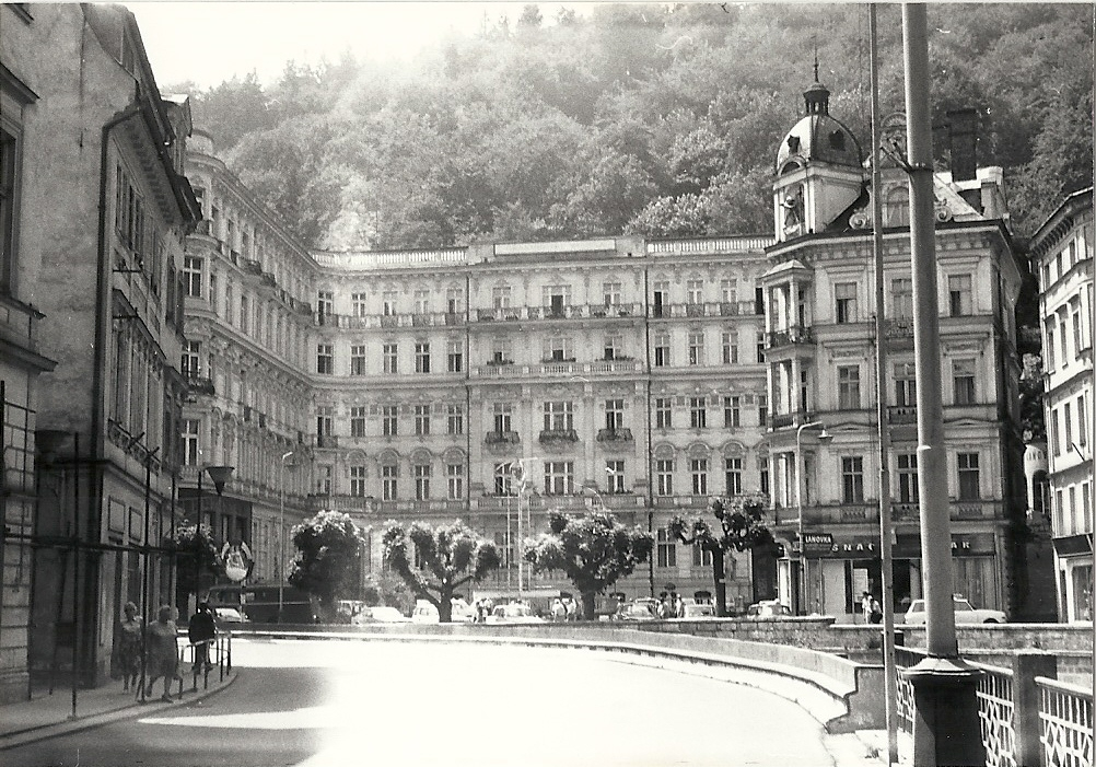 Grandhotel Pupp in Karlsbad 1977 CSSR